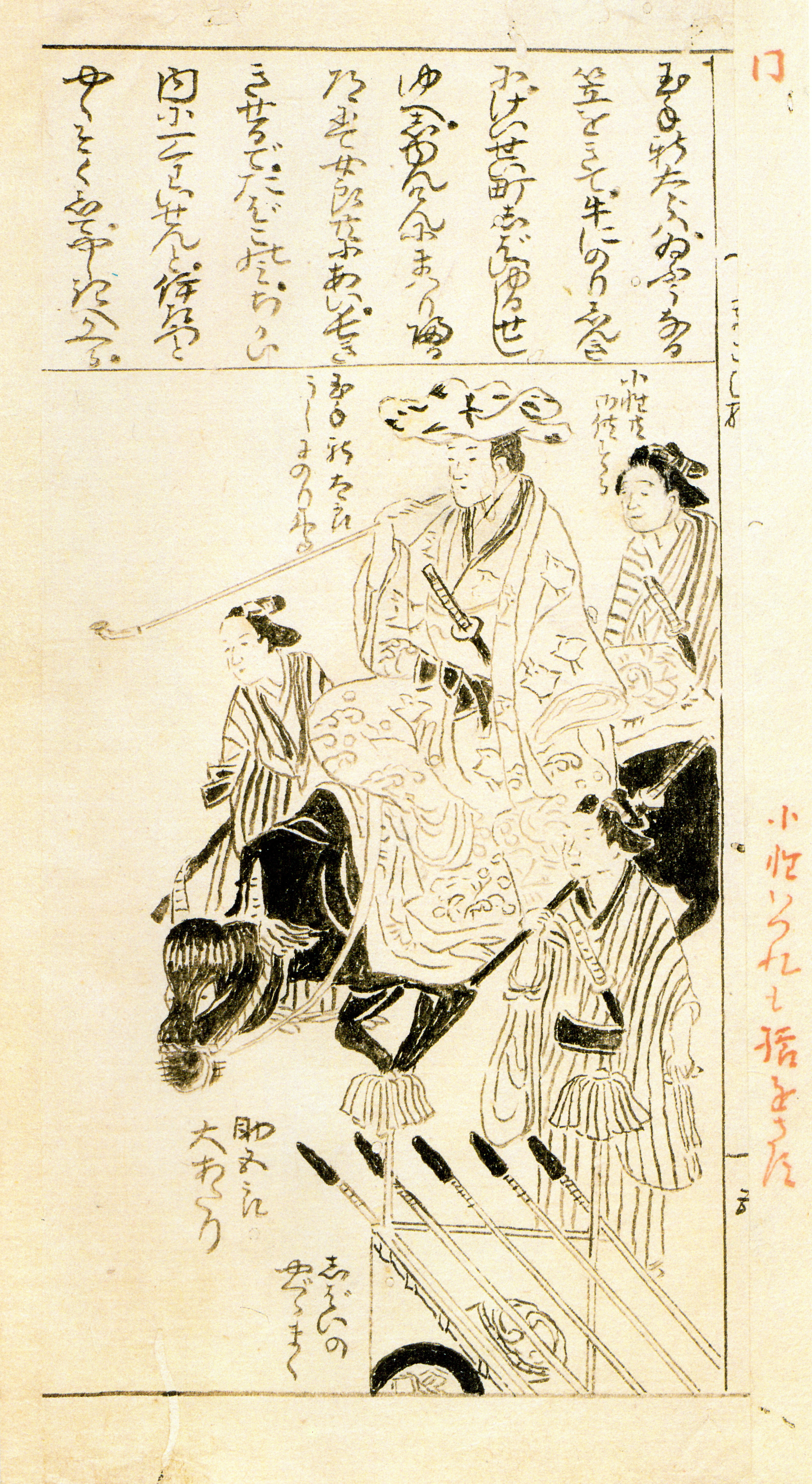 徳川宗春を描いたとされる画像。